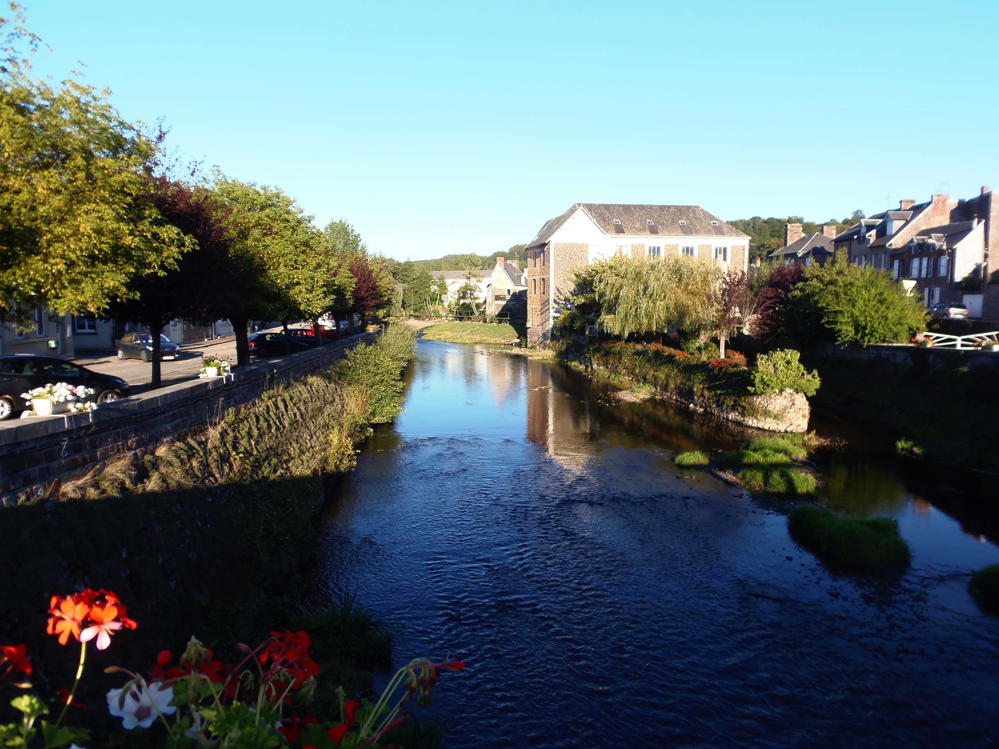 Gavray (Normandie, France). La Sienne.